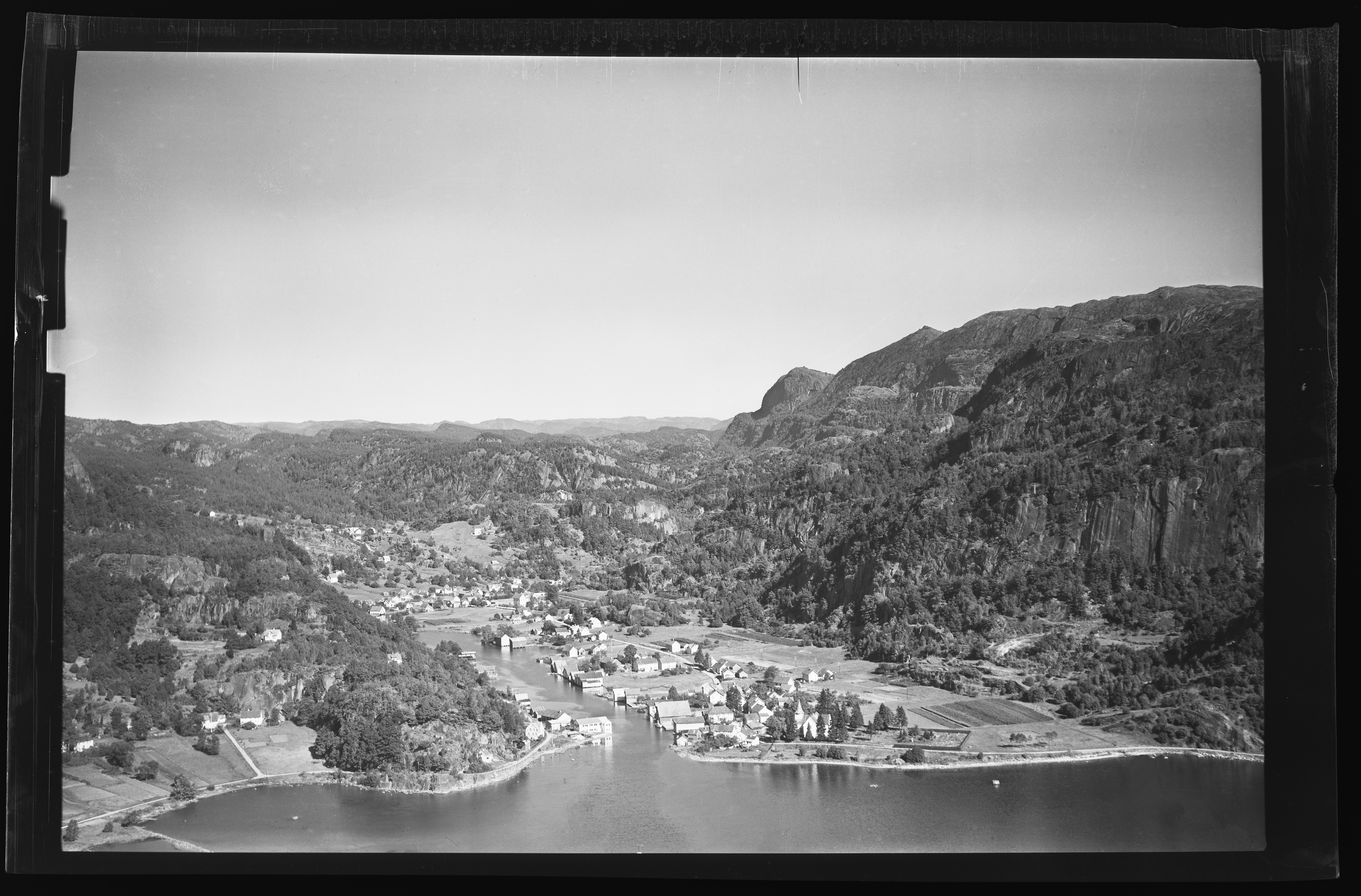 Tittel / Title: Feda Beskrivelse / Description:Tettstedet Feda i Kvinesdal kommune. Bildet viser Fedaelvens utløp på nordsiden av Fedafjorden. På østre elvebredd, til høyre i bildet, ligger Feda Kirke fra 1802. Dato / Date: 5.9.1953 Sted / Place: Kvinesdal kommune i Vest-Agder Fotograf / Photographer: Vilhelm Skappel Bildesignatur / Image Number: NB_KK_WF_062027 Digital kopi av original / Digital copy of original: s/h negativ, acetat-base, ca. 13 x 19,5 cm. Eier / Owner Institution: Nasjonalbiblioteket / National Library of Norway Lenke / Link